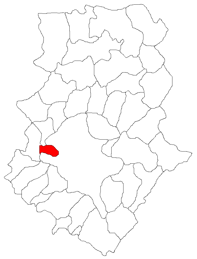 Categorie:Hărţi ale judeţului Ilfov